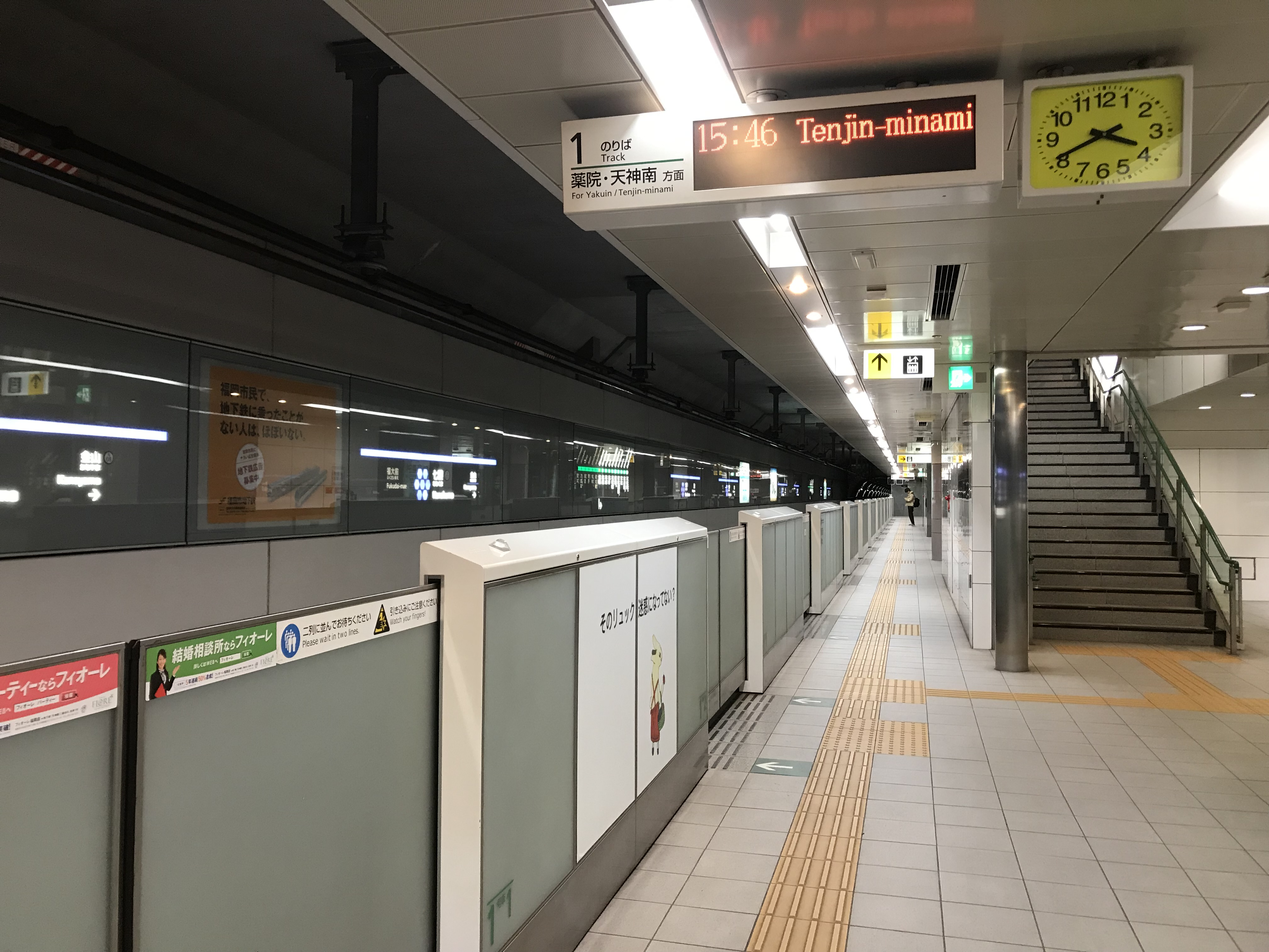 七隈駅のホーム(奥は金山方面)